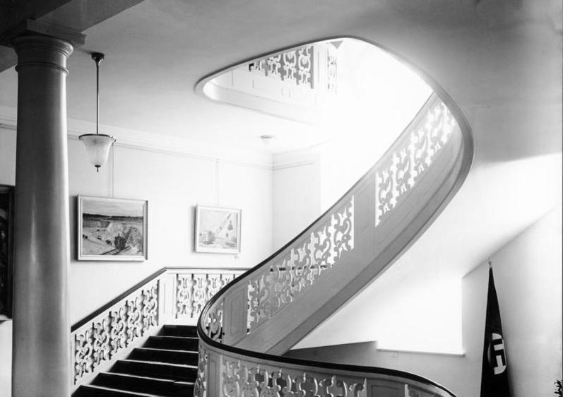 Berlin; Schloss Niederschönhausen Treppenhaus um 1685 1936